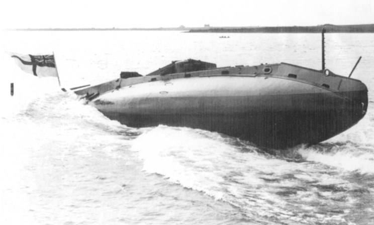 Субмарина Великобритании, Голландия 1